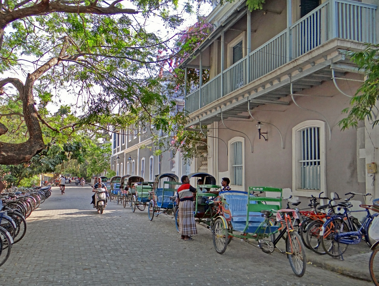 La rue François Martin est parallèle à la mer, elle est bordée de bâtiments à façades grises qui appartiennent à l'Ashram de Sri Aurobindo Composé à l’origine de quelques bâtiments, l’ashram de Sri Aurobindo s'est étendu peu à peu dans tout ce quartier de l'ancienne ville coloniale. Tous les immeubles peints en gris et blanc sont situés dans des rues propres et plutôt bien aménagées. Près de 2 000 personnes y vivent, elles disposent d’une clinique, d'une école, d'un bureau de poste, d'une imprimerie. La maison dans laquelle Sri Aurobindo et "La Mère" ont vécu et où se trouve leur tombe, est ouverte aux visiteurs. On y trouve une librairie avec les oeuvres des fondateurs en plusieurs langues. Néanmoins tout ne semble pas parfait dans cet ashram car plusieurs dizaines de plaintes ont été déposées en 2013 par des "résidents" pour maltraitance et harcèlement sexuel ! La ville de Pondichéry a été construite selon un plan « en damier » avec des rues parallèles et perpendiculaires. Un grand canal sépare à l’ouest la «ville noire », la partie indienne et à l’est «la ville blanche», l’ancien secteur colonial qui s’étend jusqu’en front de mer et où se trouvaient les bâtiments publics. Article de Wikipedia sur Pondichéry Historique des bâtiments de Pondichéry